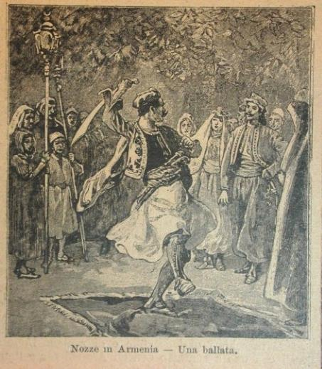 Танец с саблей.